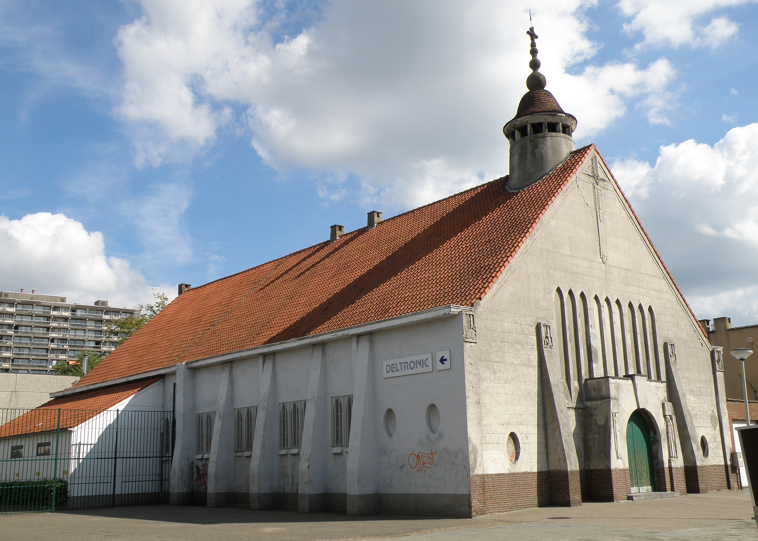 Anvers, Belgique. Église paroissiale Notre-Dame-du-Perpétuel-Secours (en néerl. OLV Altijddurende Bijstand), de style Art déco, sise Merksemsesteenweg (chaussée de Merksem), à Deurne-Nord, dans la proche banlieue nord-est d’Anvers. Plans de l’arch. Jef Huygh, 1924-1925. Façade occidentale et face nord.